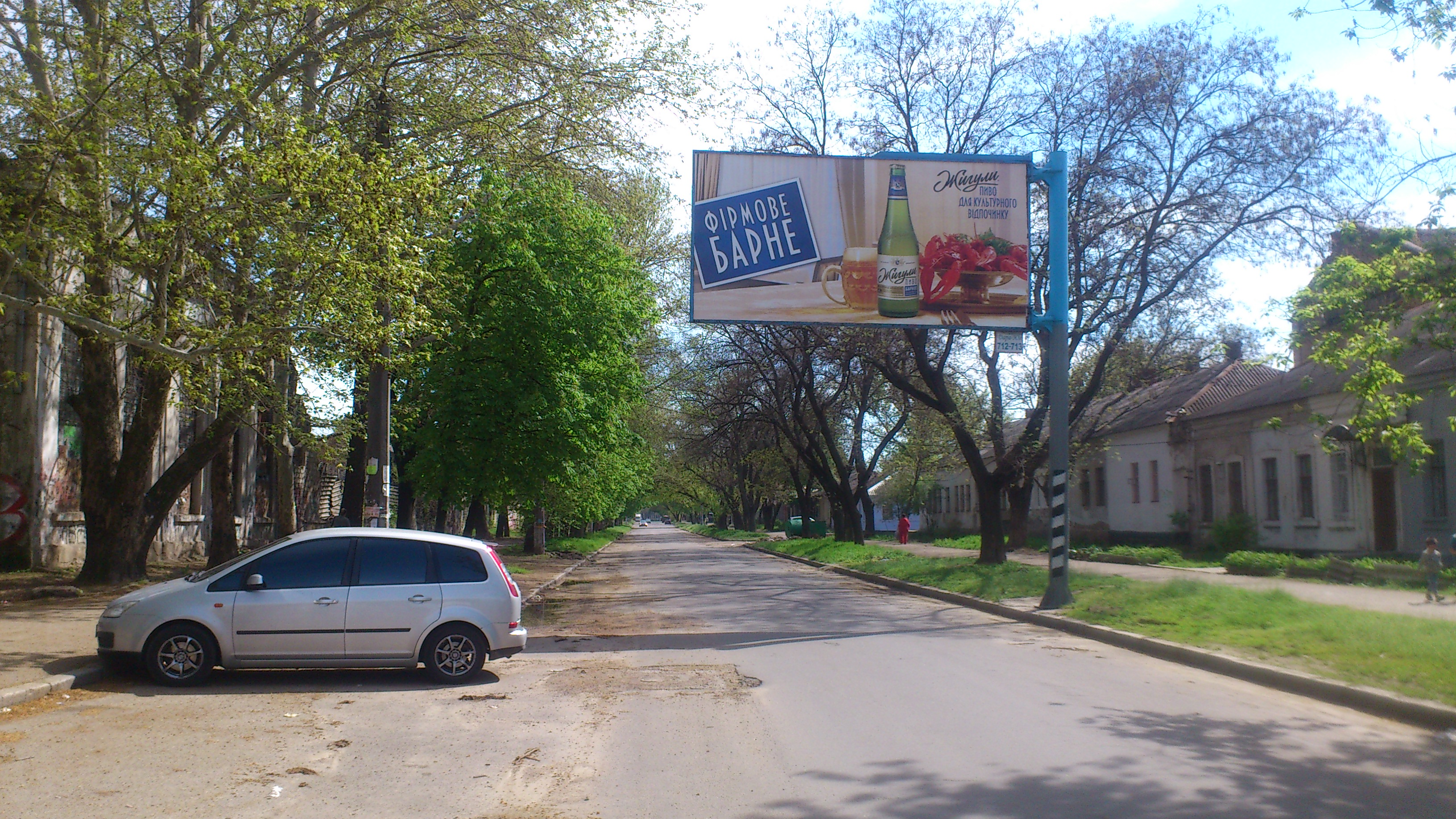 Вулиця Мала морська в Миколаєві